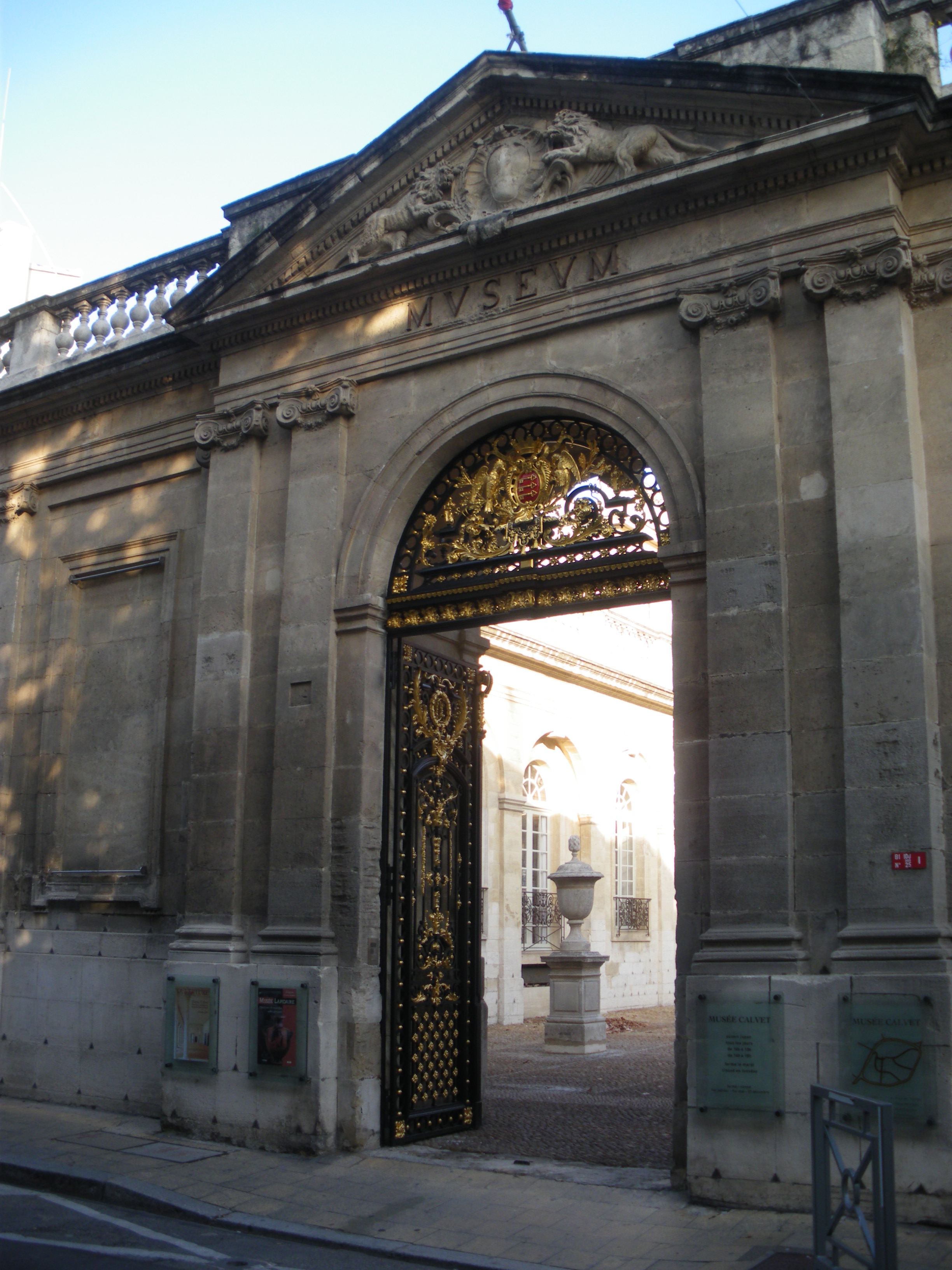 Portail du musée Calvet, Avignon